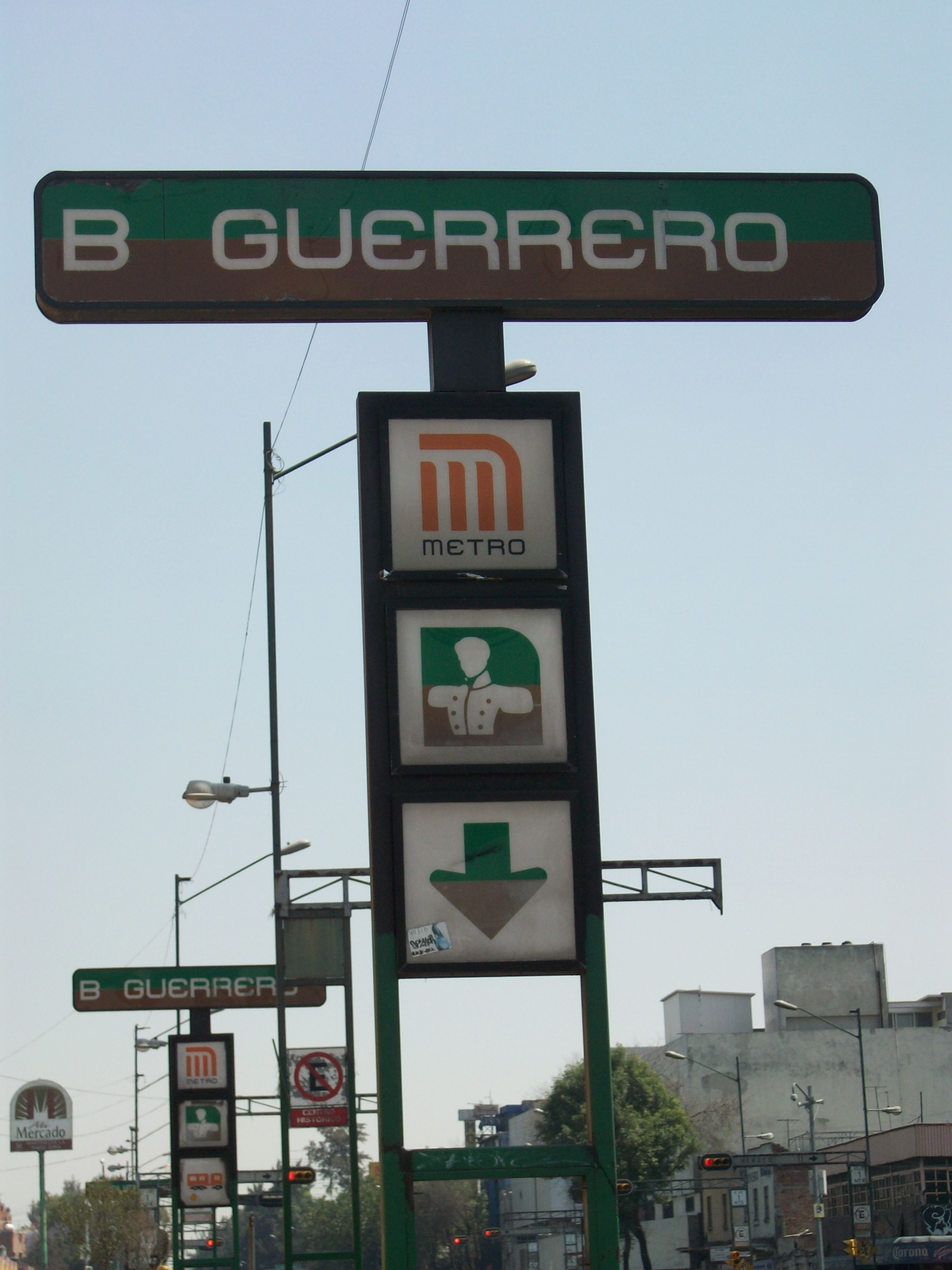 Letrero de la estacion Guerrero linea B